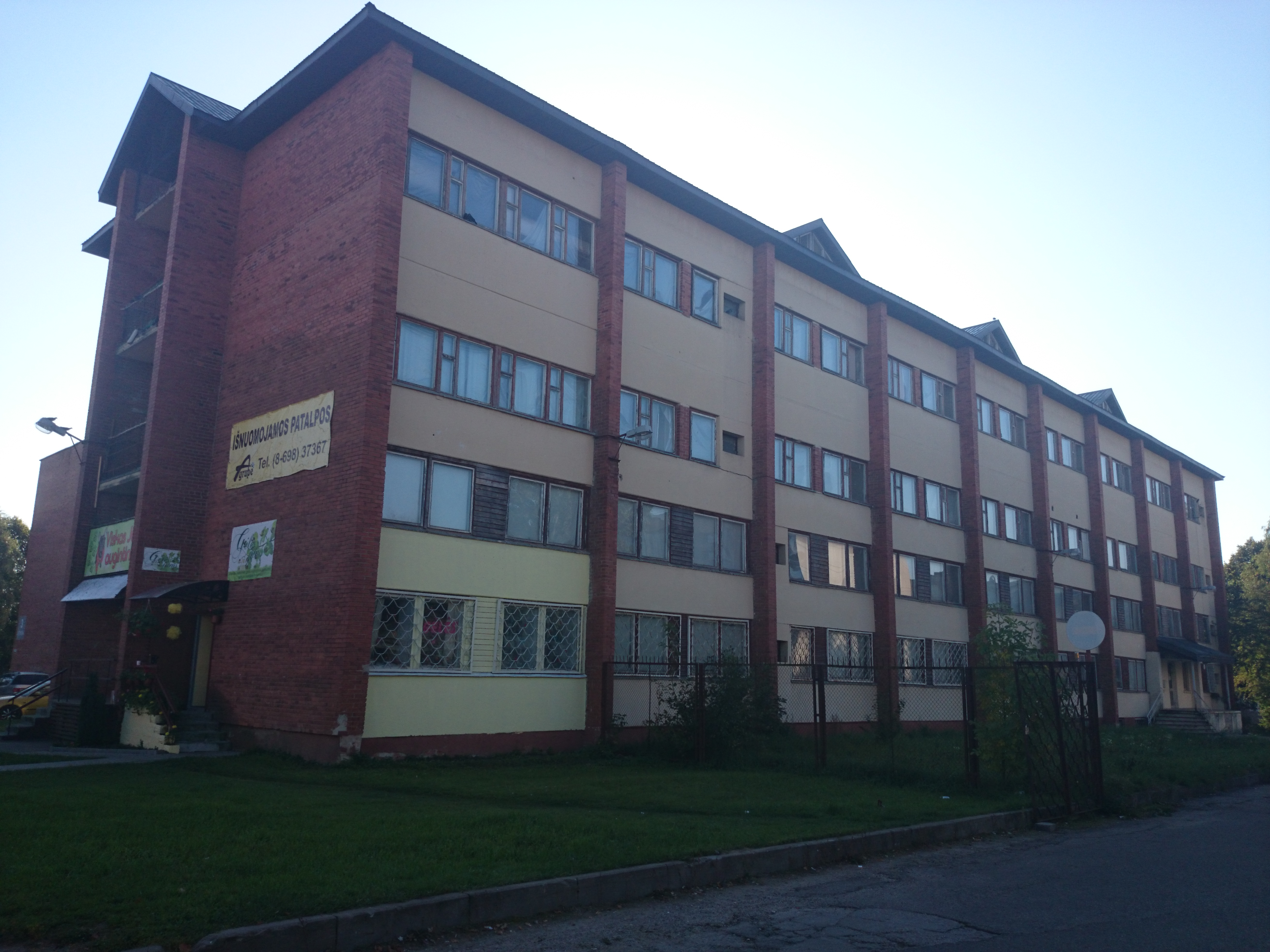 UAB Jonatex (Kosmonautai, Jonava)